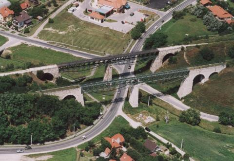 La viadukto.